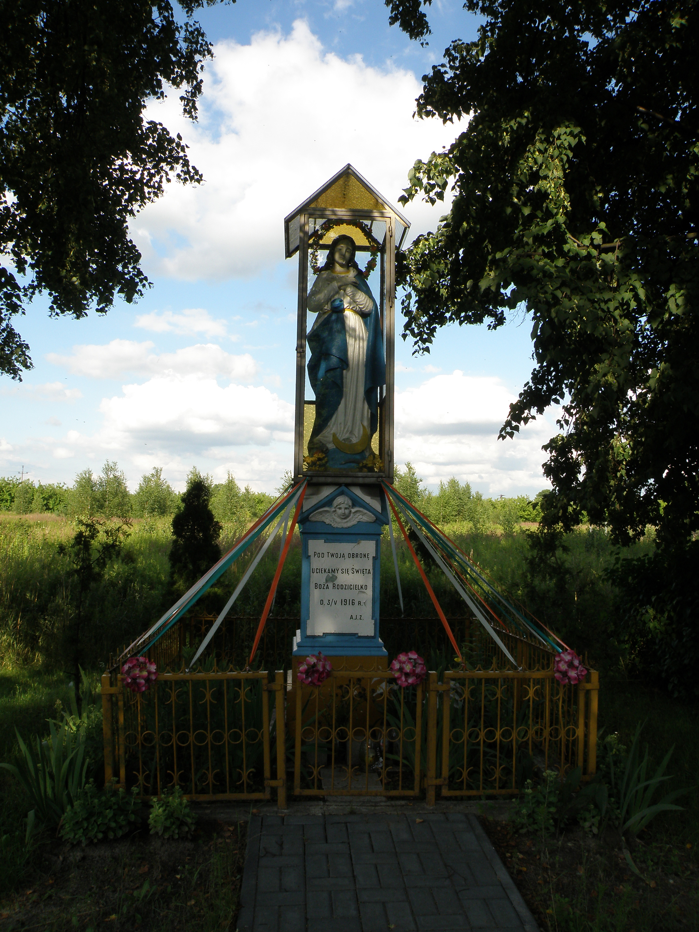 Sobiekursk - województwo mazowieckie, powiat otwocki, gmina Karczew.